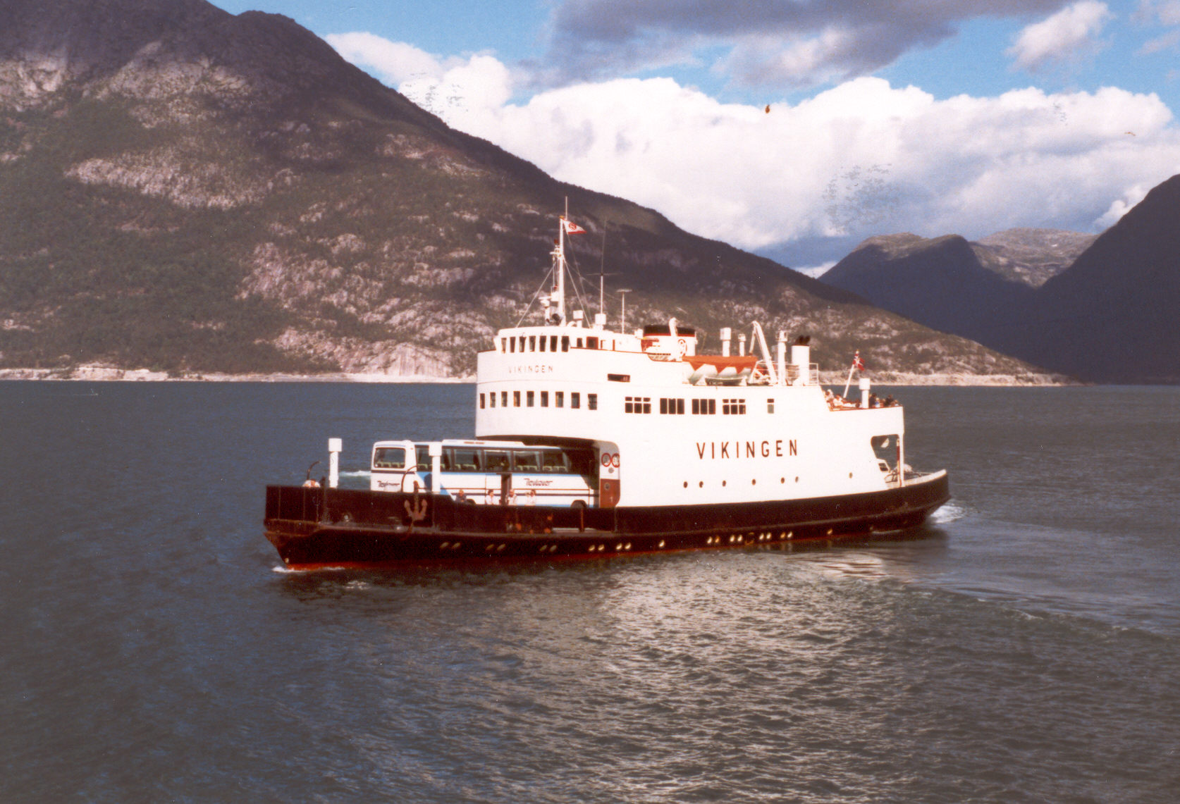 MF «Vikingen», built 1957.